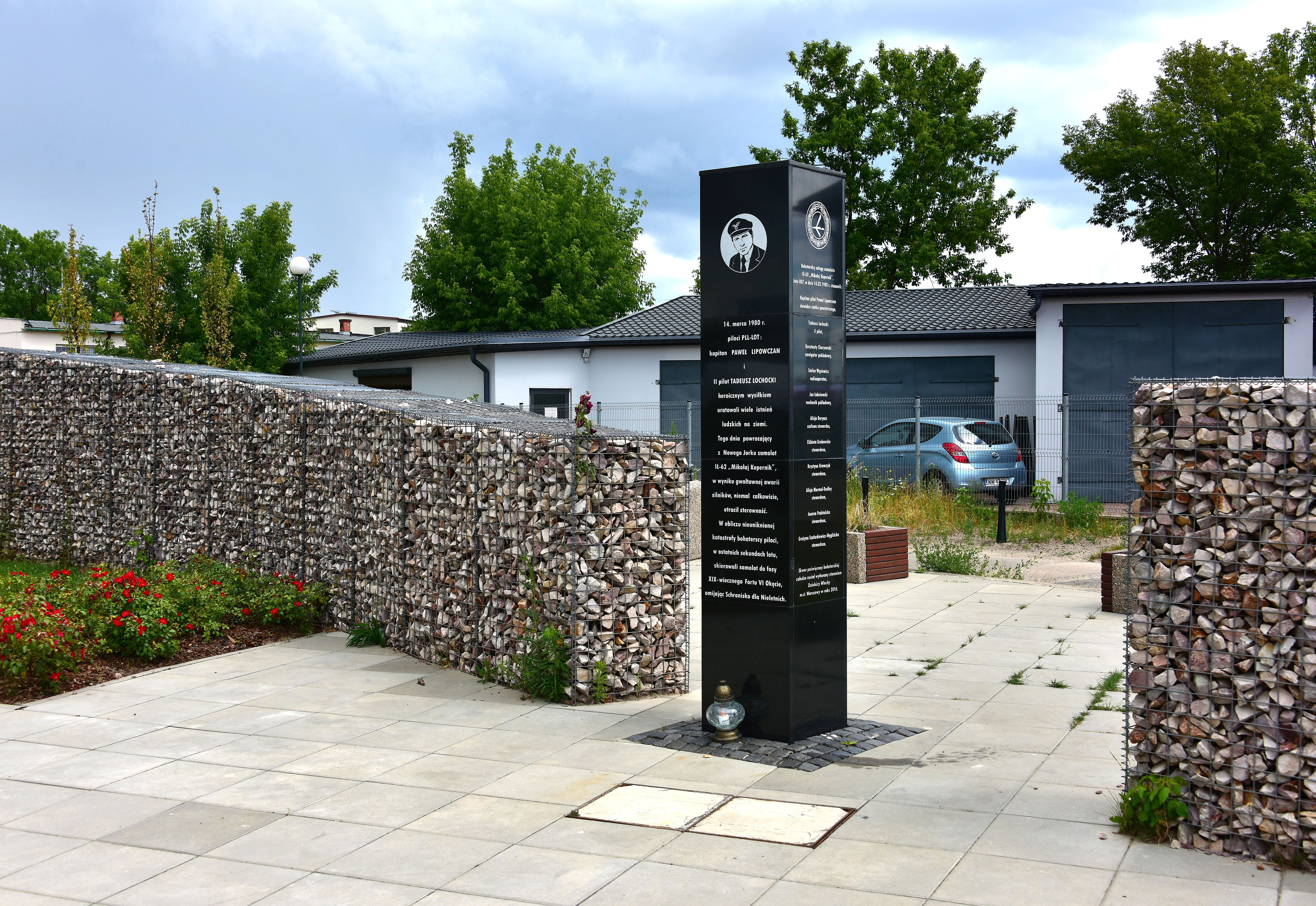 Pomnik załogi lotu PLL LOT 007 przy ul. Lipowczana róg Materii w Warszawie